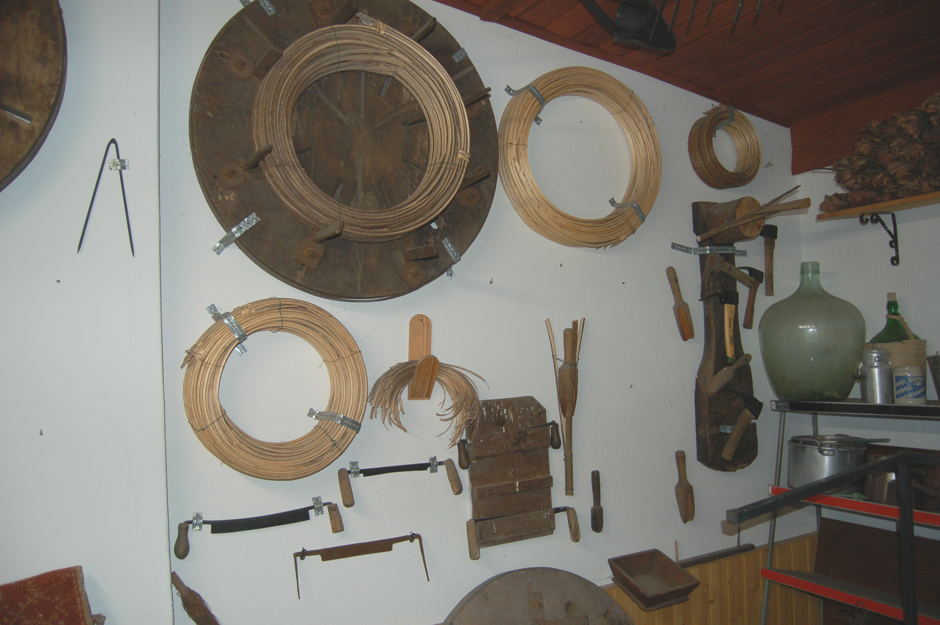 Historische Fassreifen und Bandreißerwerkzeug im Hobby-Heimat-Museum Hetlingen